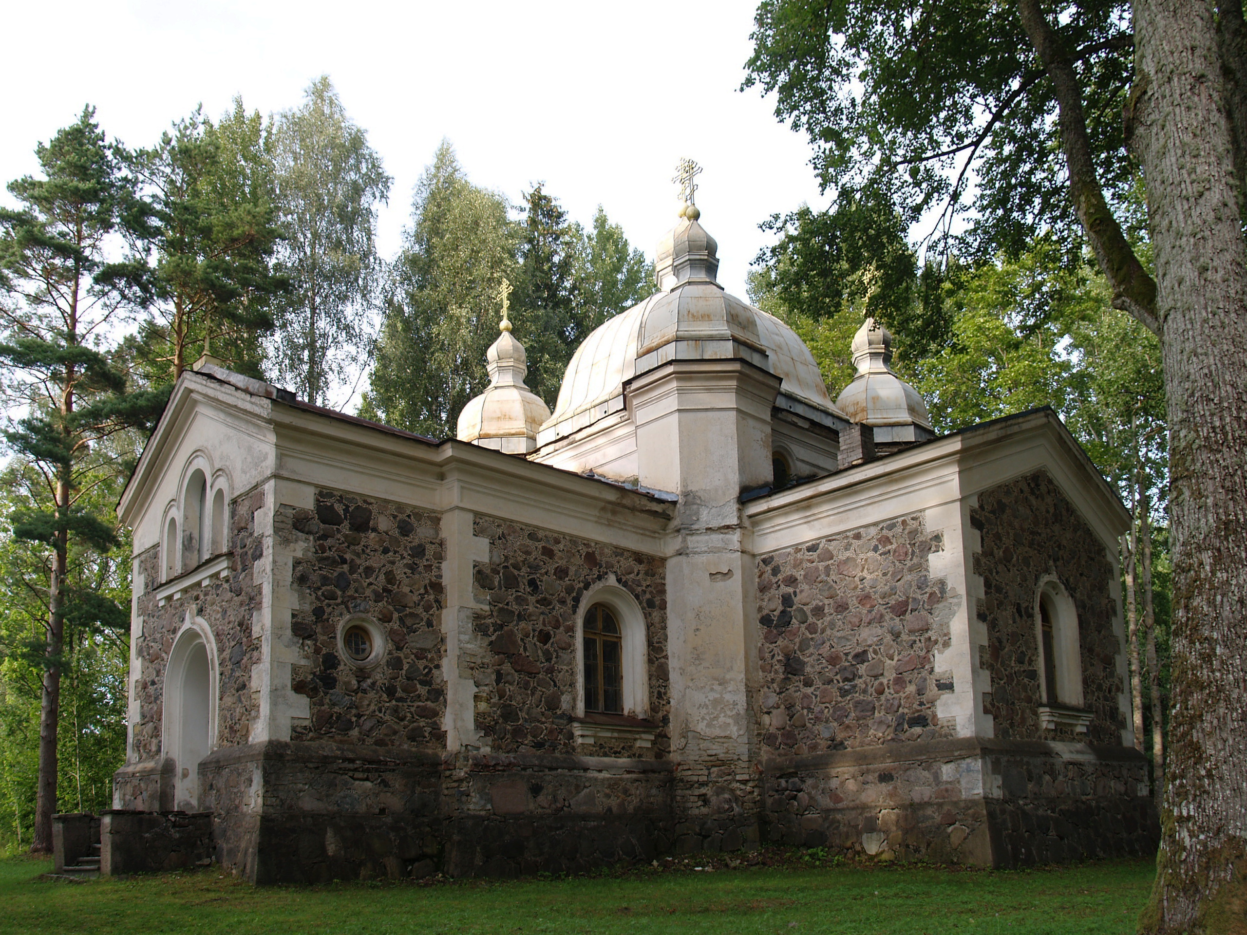 Uruste õigeusu kirik